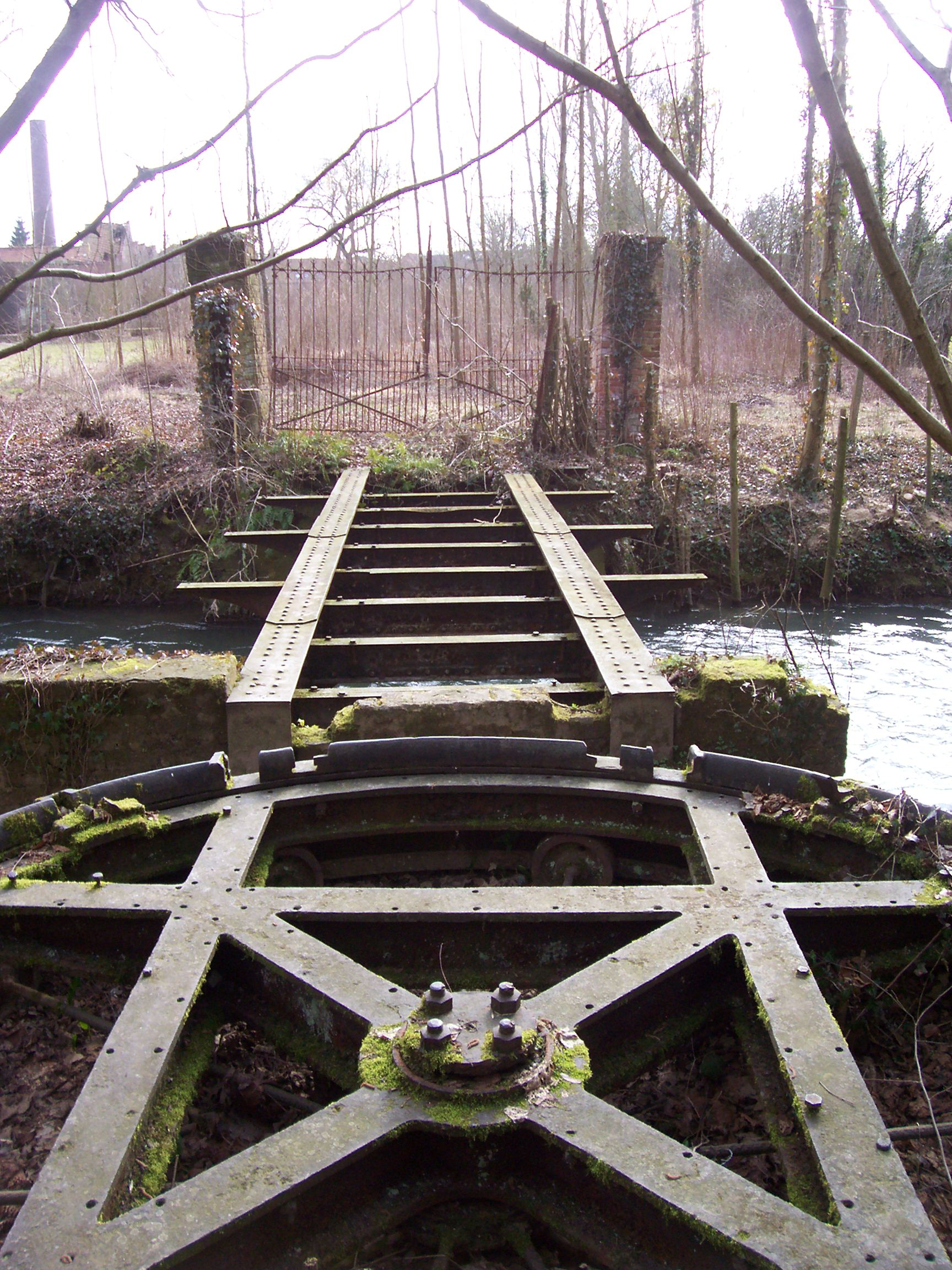 Ancienne plaque tournante ferroviaire et pont, Wavrans-sur-l'Aa, Pas-de-Calais, France.